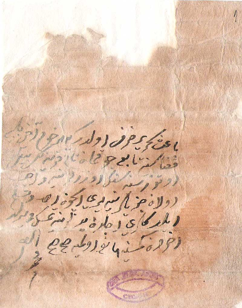 Записка за платен данък джизие от жителите на село Чокманово, Смолянско в 1615 година.